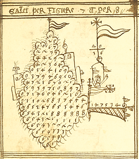 La divisione secondo il metodo "per galera", derivata da quella con l'abaco (utilizzata fino a secolo XV).